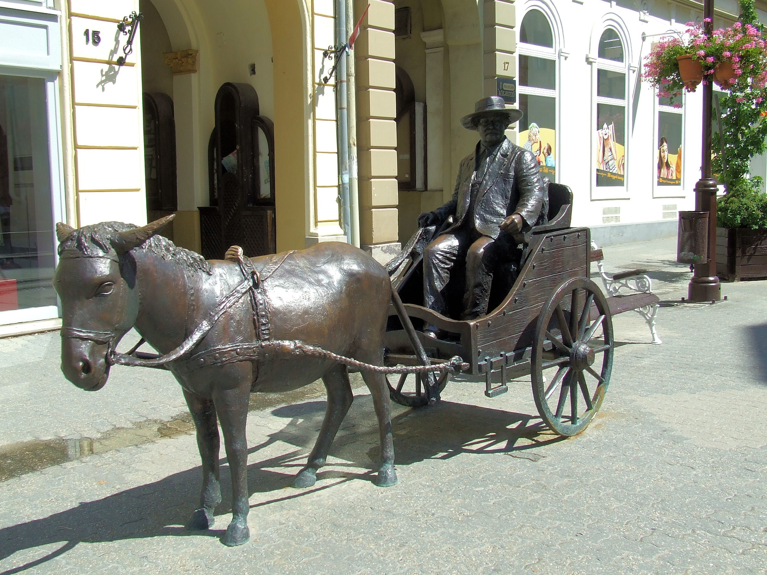 Rippl-Rónai József szobra Kaposváron (Fő utca). Trischler Ferenc szobrászművész alkotása (2009)